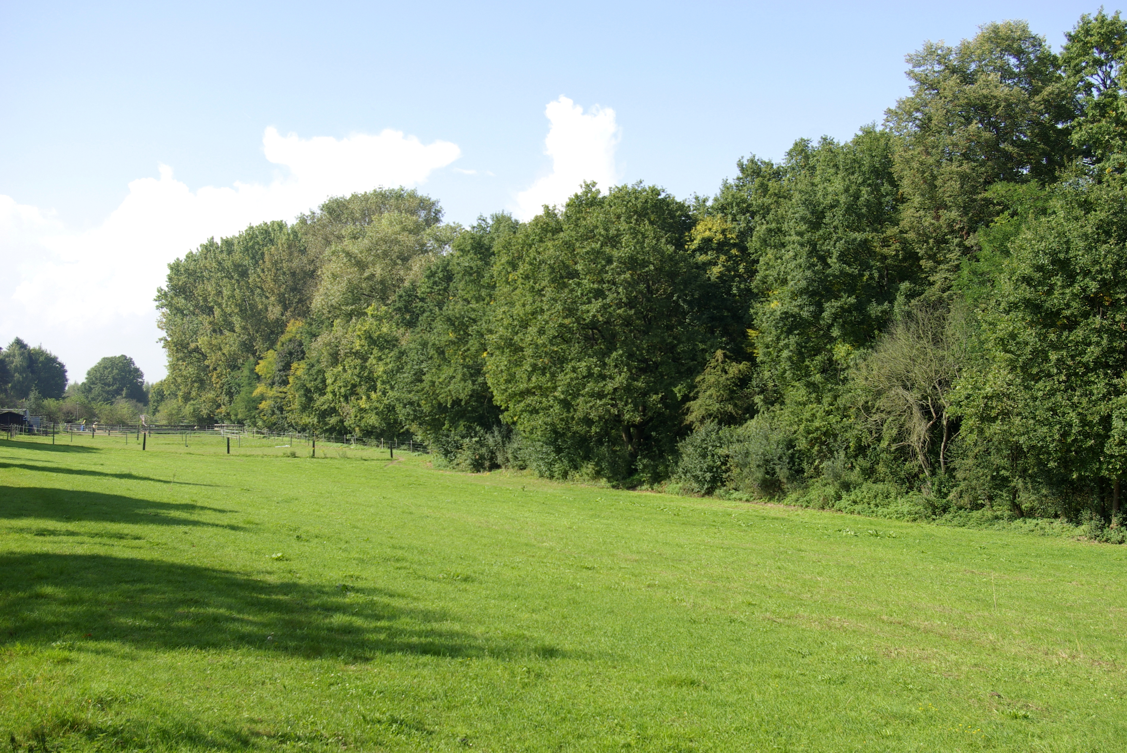 Das Landschaftsschutzgebiet Talzug Heidestraße am Dillergraben im Fürther Ortsteil Unterfarrnbach.